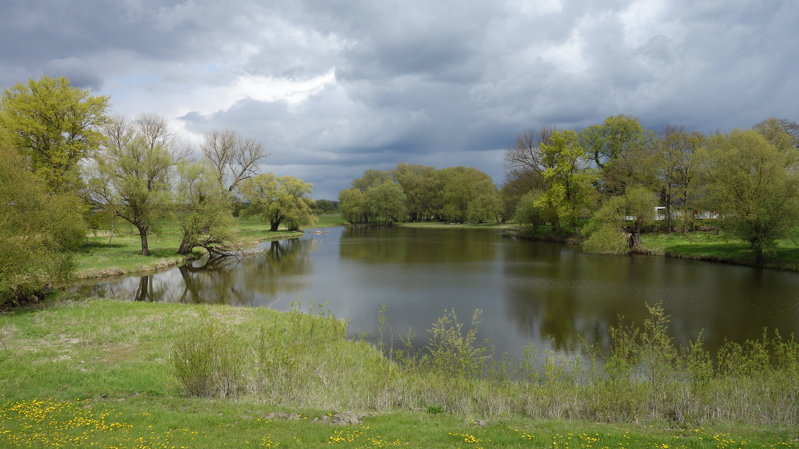 Elbe-Auen am Deich in Cumlosen, dem ehemaligen Naturschutzgebiet Elbdeichvorland, das heute ein Teil des Biosphärenreservat Flusslandschaft Elbe-Mecklenburg-Vorpommern ist.